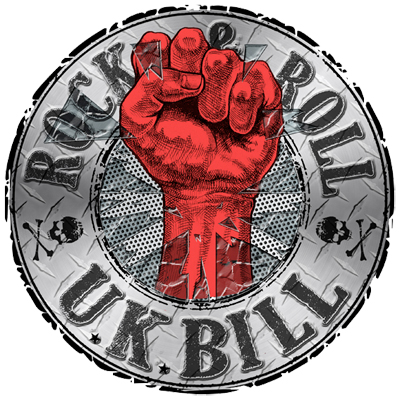 Donostia